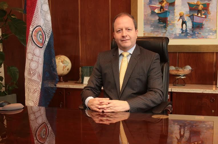 PhD Carlos Fernández Valdovinos